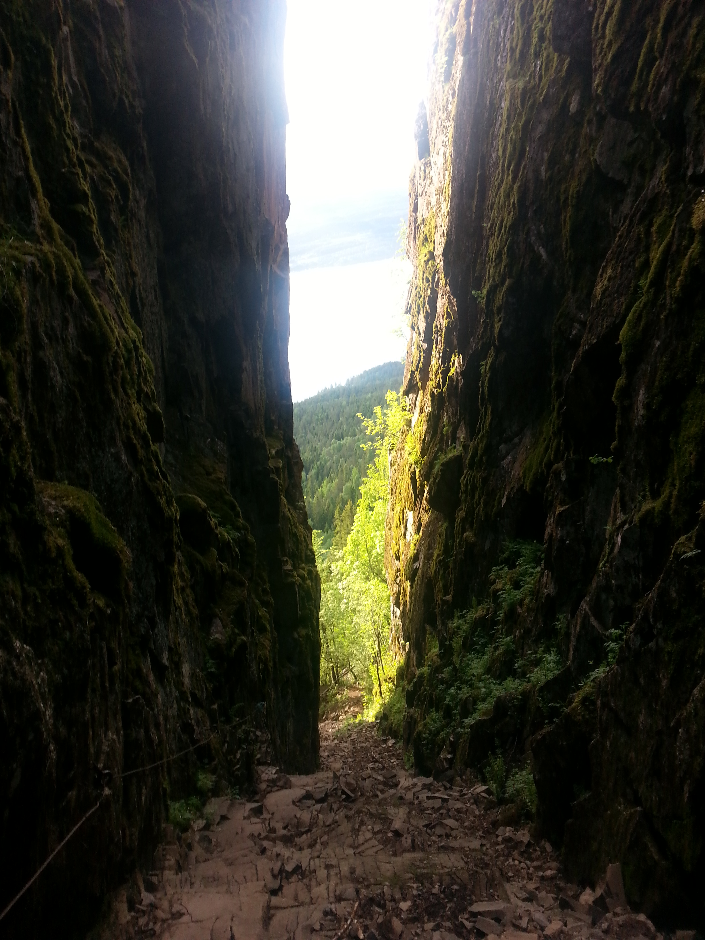 Mørkgonga i Krokskogen i Åsa.